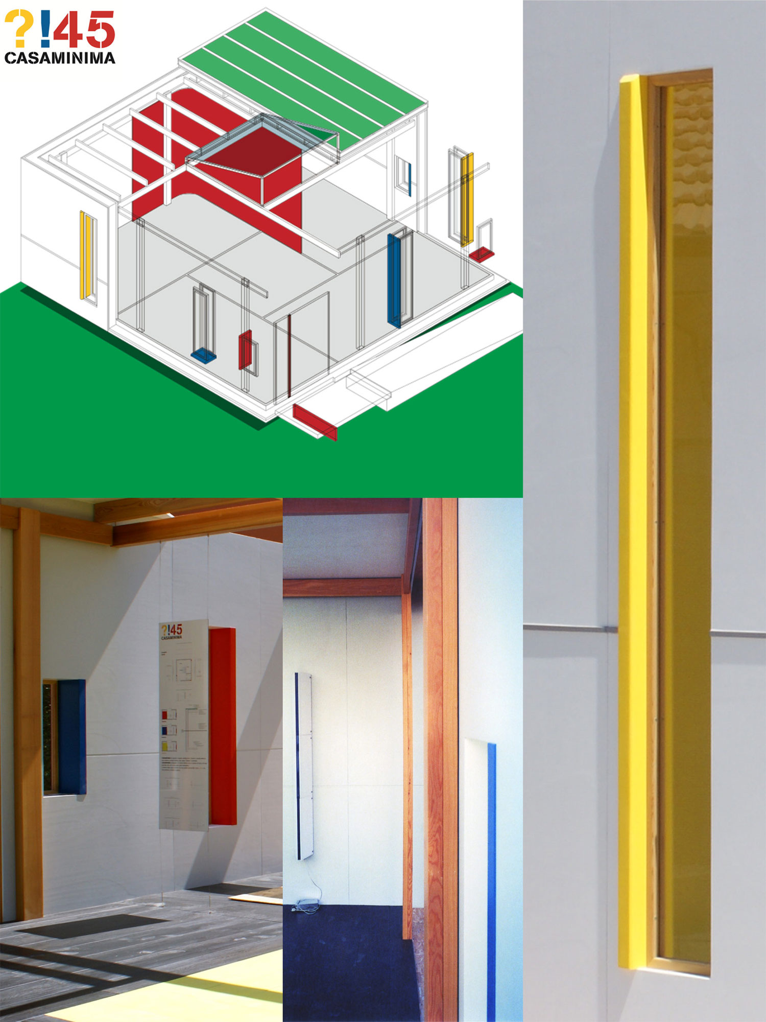 Casaminima "45"